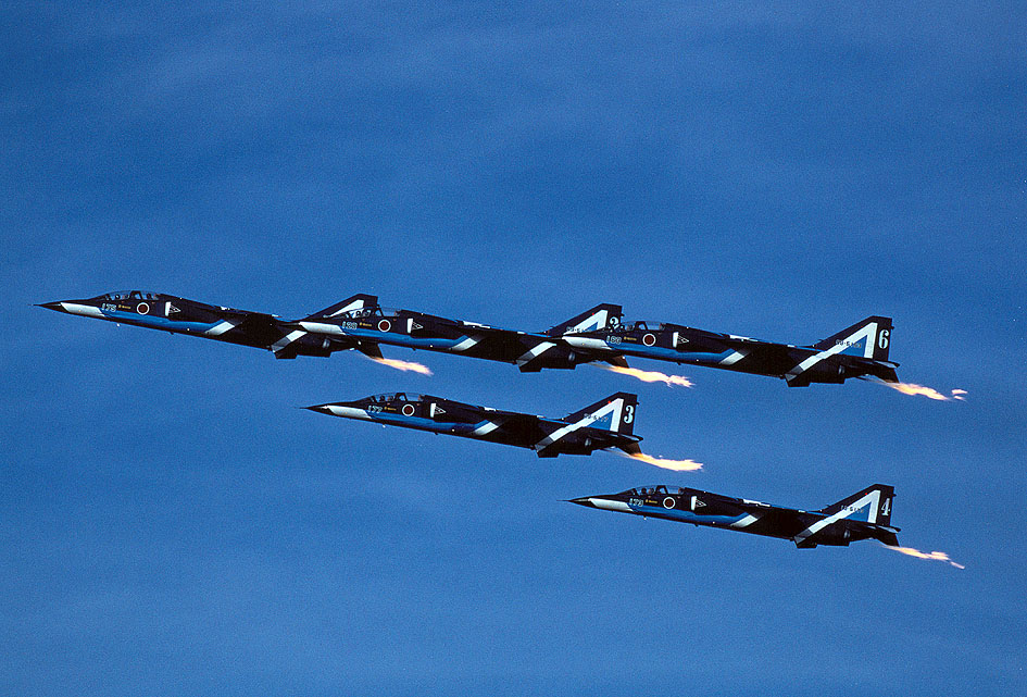 航空自衛隊 ブルーインパルス T-2 テイクオフ